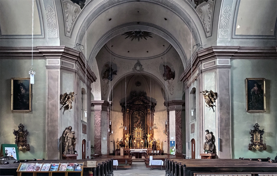 Pfarrkirche St. Joseph in Margarethen, Innenansicht